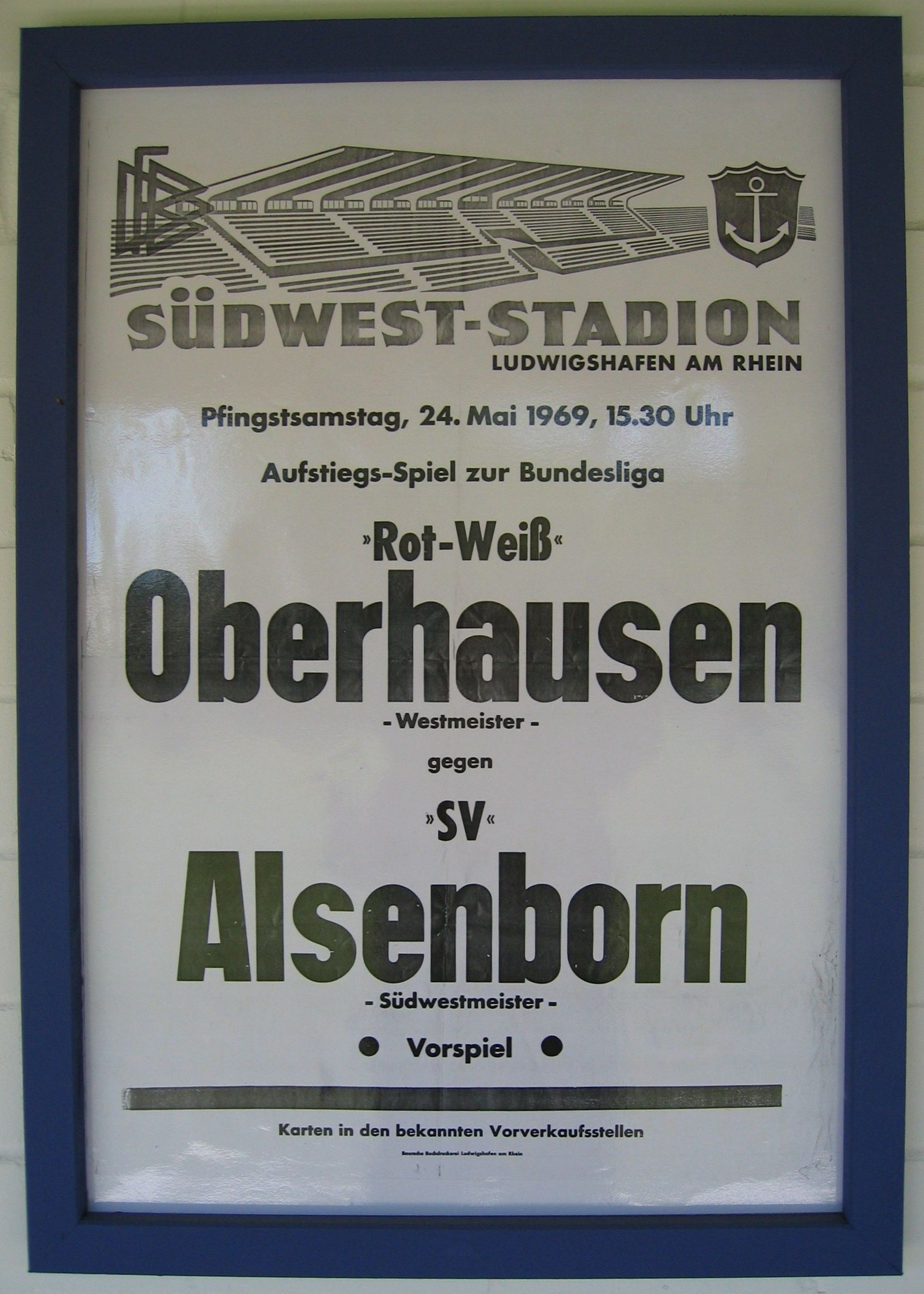 Aufstiegsspiel zur Bundesliga : SV Alsenborn gegen Rot-Weiß Oberhausen am 24.Mai 1969 im Südwest-Stadion in Ludwigshafen am Rhein